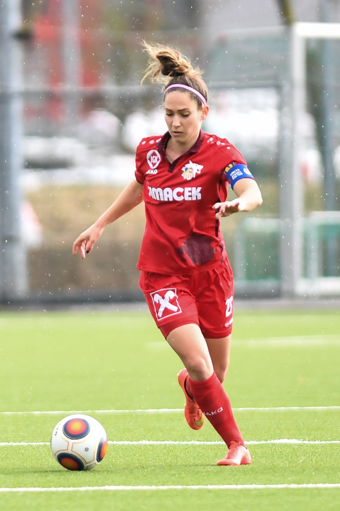 St. Pölten, Österreich, 19.3.2017, Sport, Fussball, OEFB Frauen Bundesliga - SKN St. Poelten vs SK Sturm Graz. Bild zeigt Jasmin Eder (SKN).